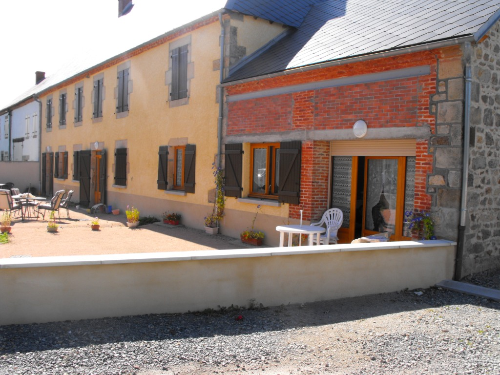 Trois Appartements rénovés et mis à disposition par OPHIS